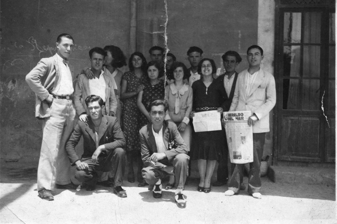 A la paret, darrera en Joan Mercant, primer a l'esquerra, s'endevina un Viva la República escrit amb guix. N'Aurora és la tercera per la dreta i mostra un exemplar de Nuestra Palabra, per la contraportada.